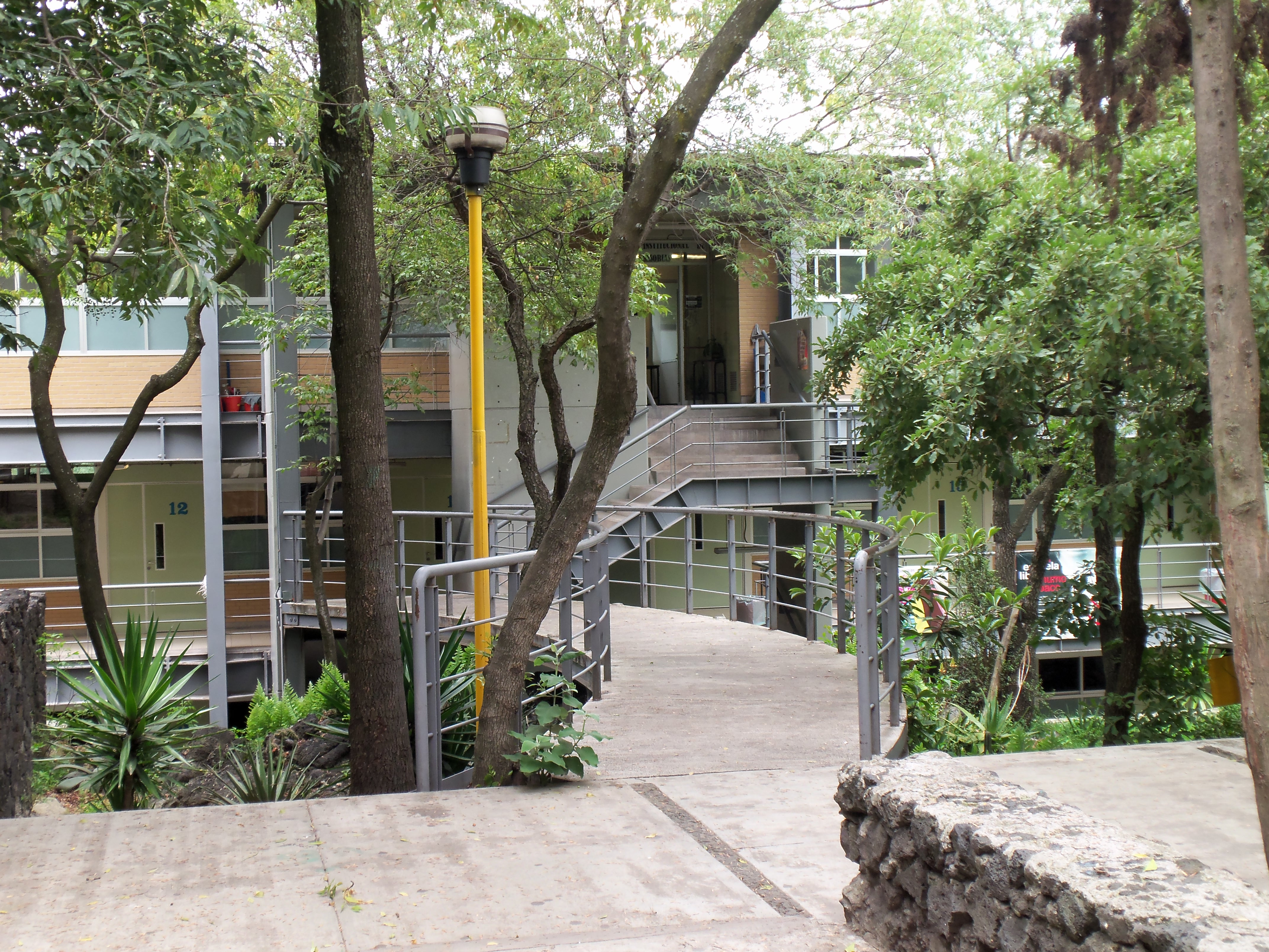 Entrada al edificio de idiomas